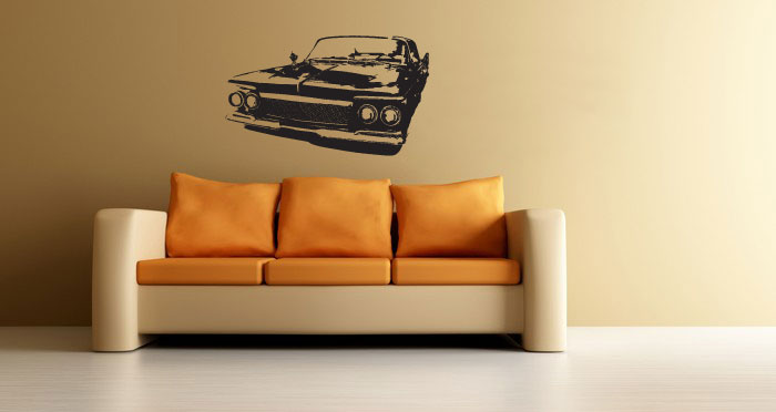 Česky: Retro americké auto